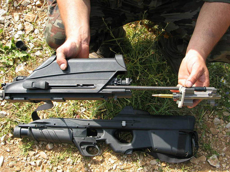 Puška FN F2000 S slovenske vojske, delno razstavljena.